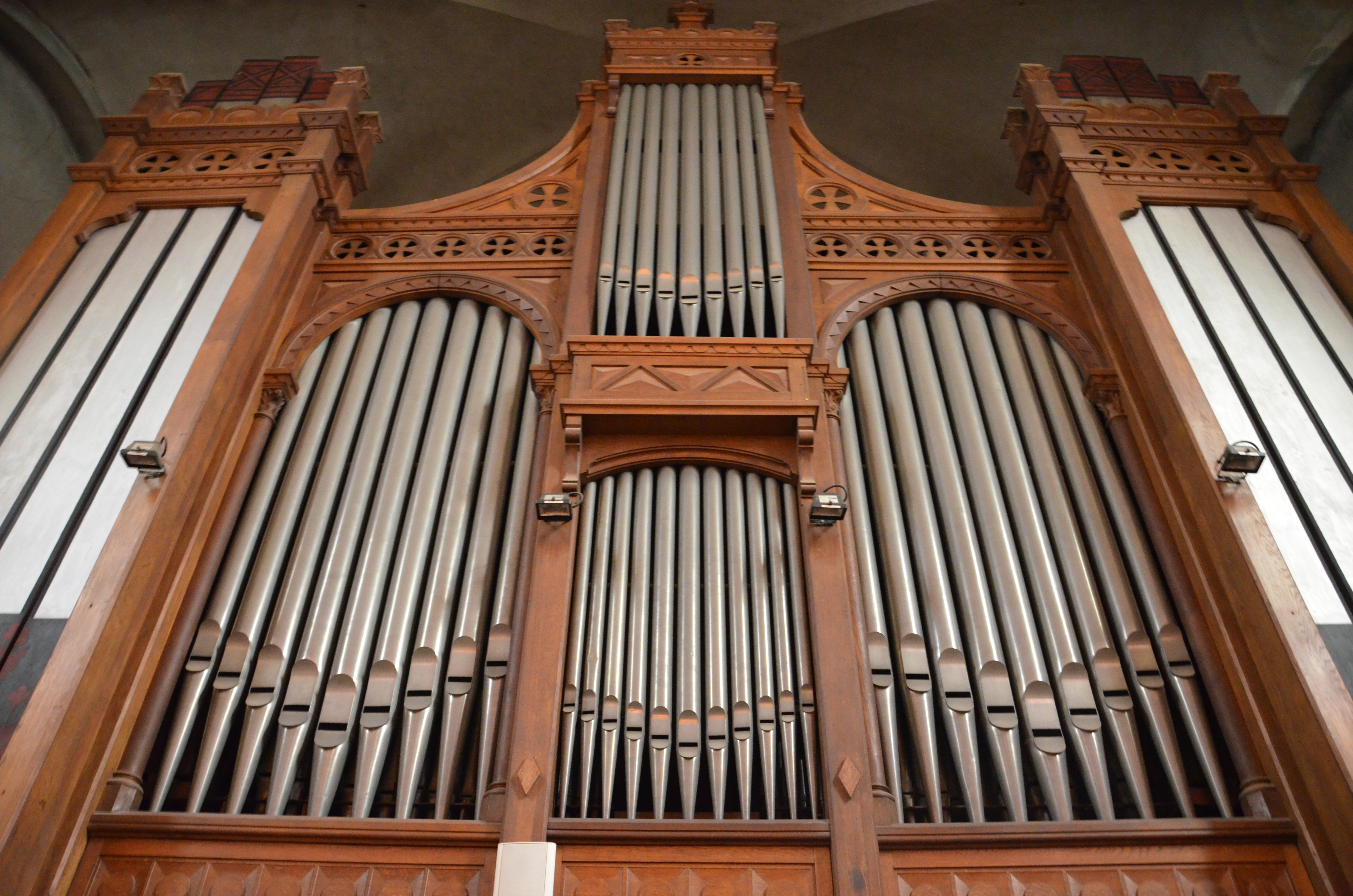 Intérieur de la cathédrale Saint-Vincent-de-Paul de Tunis (Tunisie)